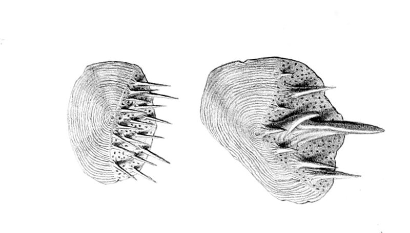 Cetonurus crassiceps scales